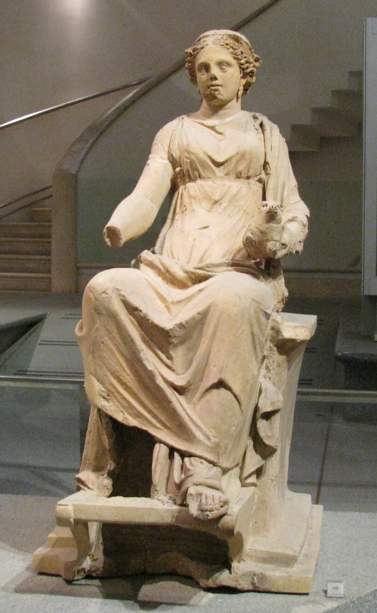 Statue en terre cuite de Demeter, tenant un porcelet reçu en offrande. Sanctuaire d'Ariccia, Latium, daté de fin IVe, première moitié du IIIe siècle av. J.-C.. Musée des thermes de Dioclétien, Rome